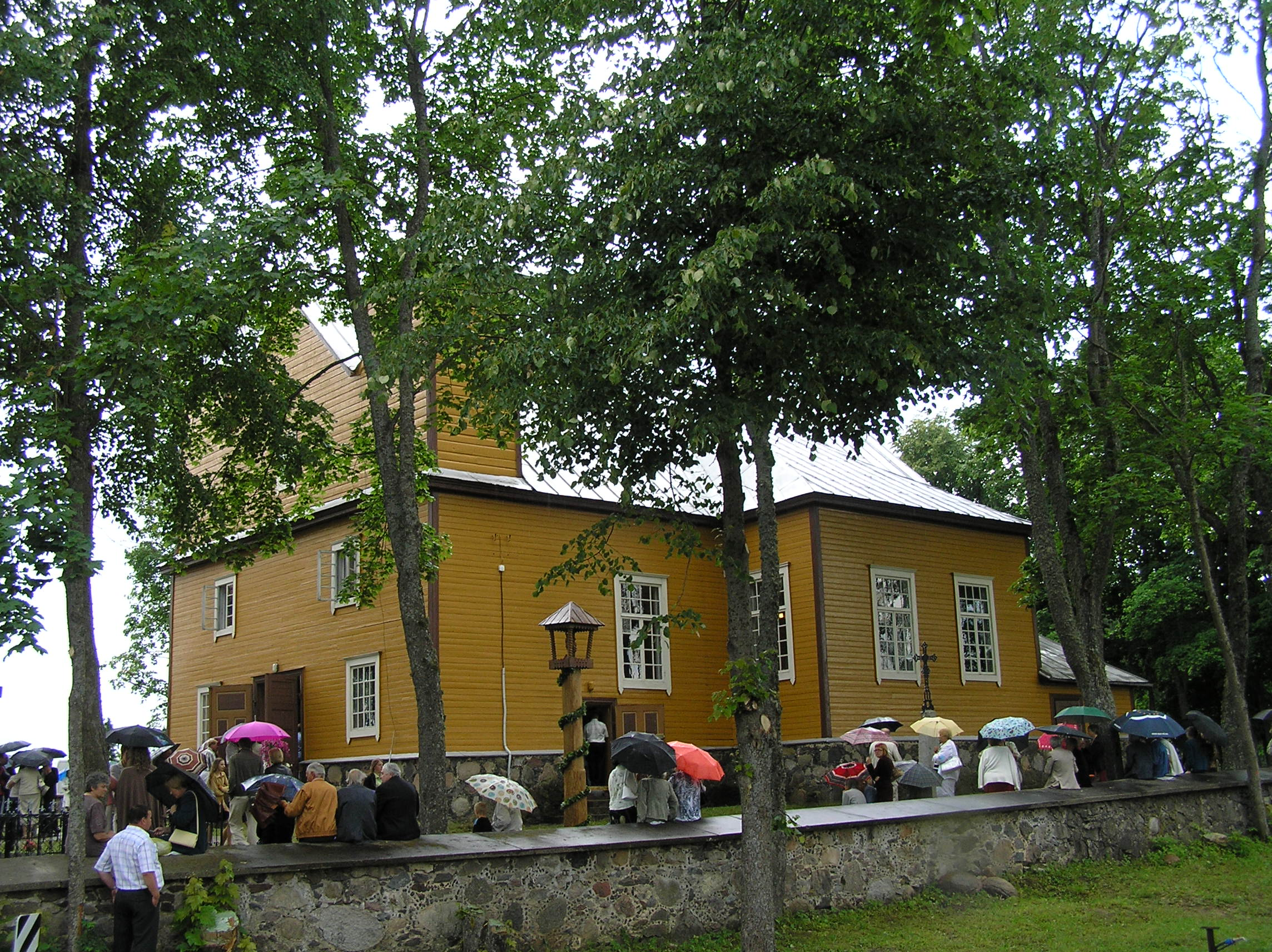 Vajasiškio bažnyčia